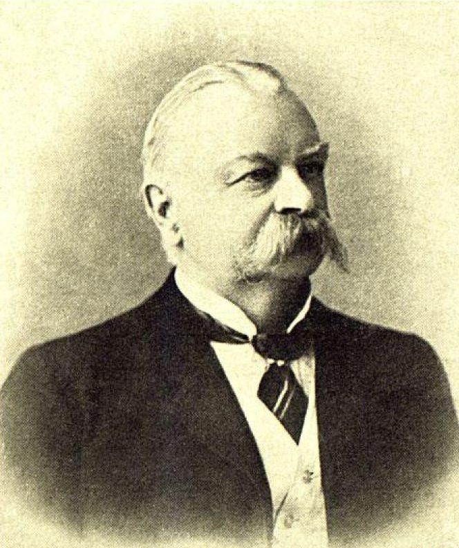 Вахтер Константин Логинович, председатель правления (1896—1906) Санкт-Петербургского частного коммерческого банка